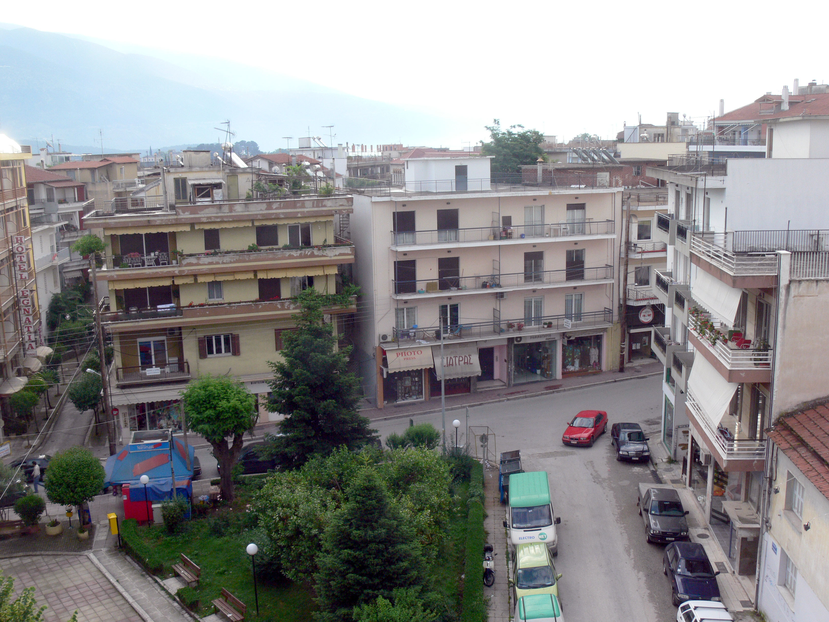 Innenstadt von Joannina